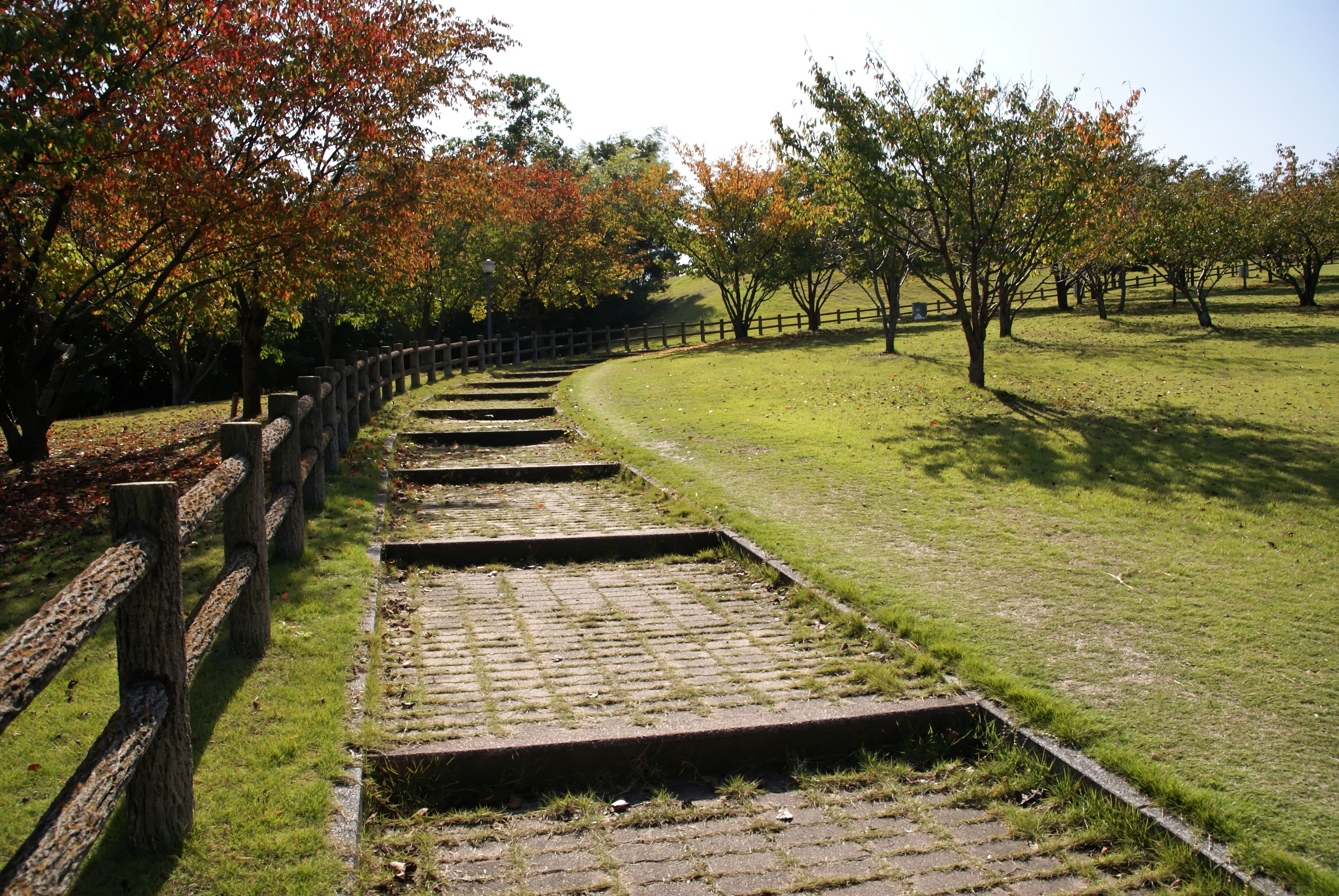 Toramaru Park in Higashikagawa, Kagawa prefecture, Japan